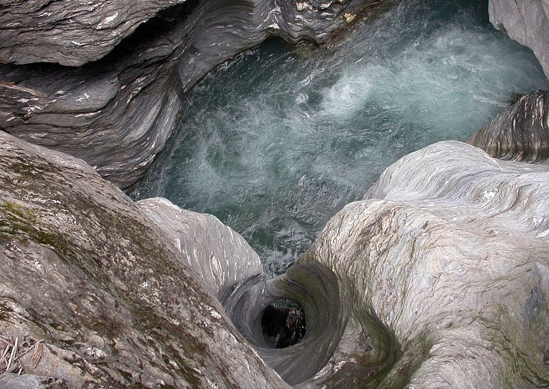 Via Mala, Schweiz